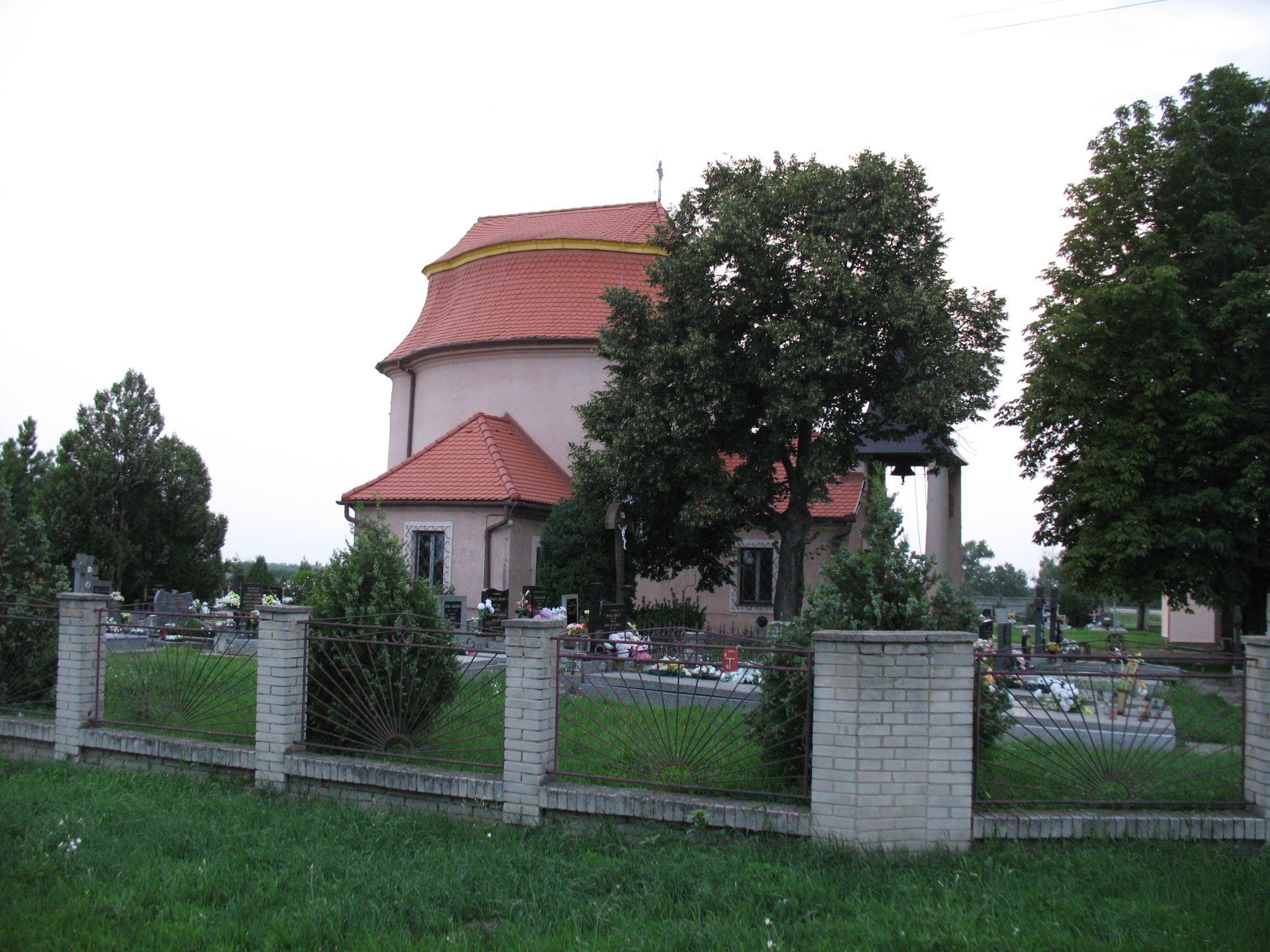 Szent Vendel templom Jattón